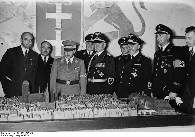 Königsberg, 27. Deutsche Ostmesse, Ausstellung Eröffnung der 27. Deutschen Ostmesse in Königsberg Beim Rundgang durch die Ausstellung von rechts nach links: Senatspräsident Greiser (Danzig), Staatssekretär Pfundtner, Staatssekretär Dr. Landfried, Gauleiter Koch [Erich] am Stand von Danzig bei der Besichtigung des grossen Modells der alten deutschen Stadt. Fot. Ho 20.8.39 Abgebildete Personen: Koch, Erich: Reichskommissar für die Ukraine, Gauleiter von Ostpreußen, Deutschland Greiser, Arthur: Senatspräsident von Danzig, Gauleiter Warthegau, Deutschland Pfundtner, Hans Dr.: Staatssekretär im Reichsministerium des Inneren, Deutschland Landfried, Friedrich Walter Dr.: Staatssekretär Reichswirtschaftsministerium, Präsident Staatsbank Preußen, Deutschland Korrigierte Legende der Personen in der ersten Reihe (Stand Mai 2013, die drei Personen dahinter sind noch nicht identifiziert): Von rechts nach links: Harry Siegmund, Arthur Greiser, Hans Pfundtner, Friedrich Landfried, Erich Koch, Erich Neumann (Staatssekretär) (ganz links)